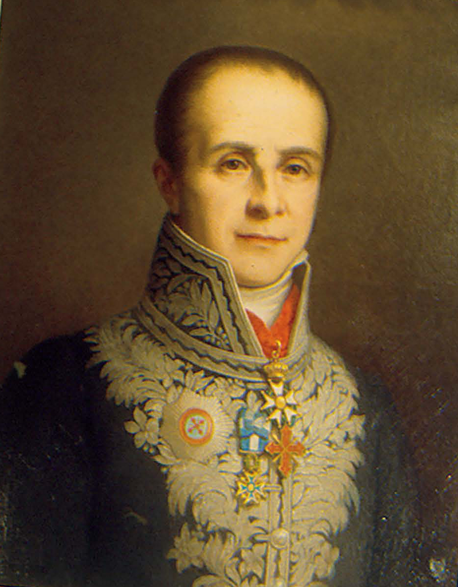 Christophe de Villeneuve-Bargemon